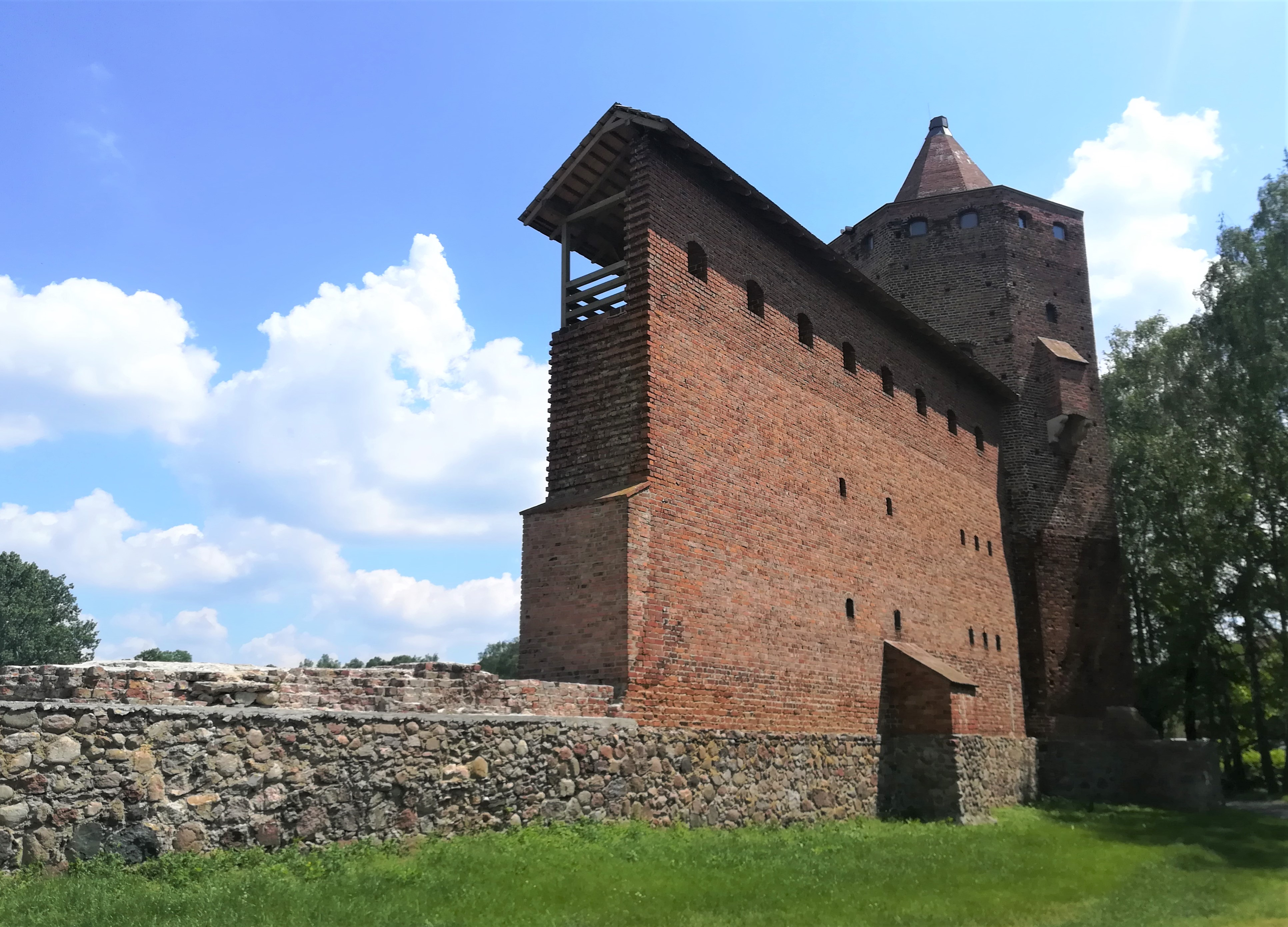 Zamek książąt mazowieckich w Rawie Mazowieckiej.